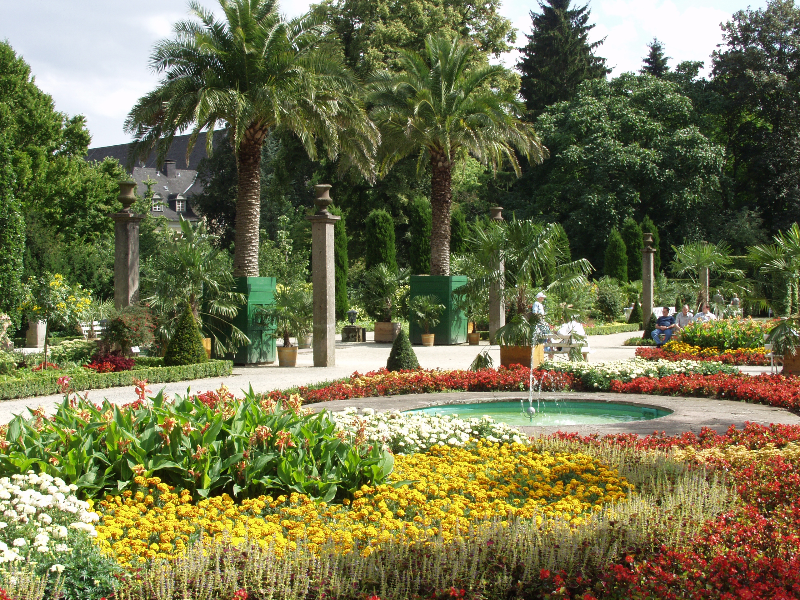 Der Palmengarten, der den Kurpark in Bad Pyrmont berühmt machte